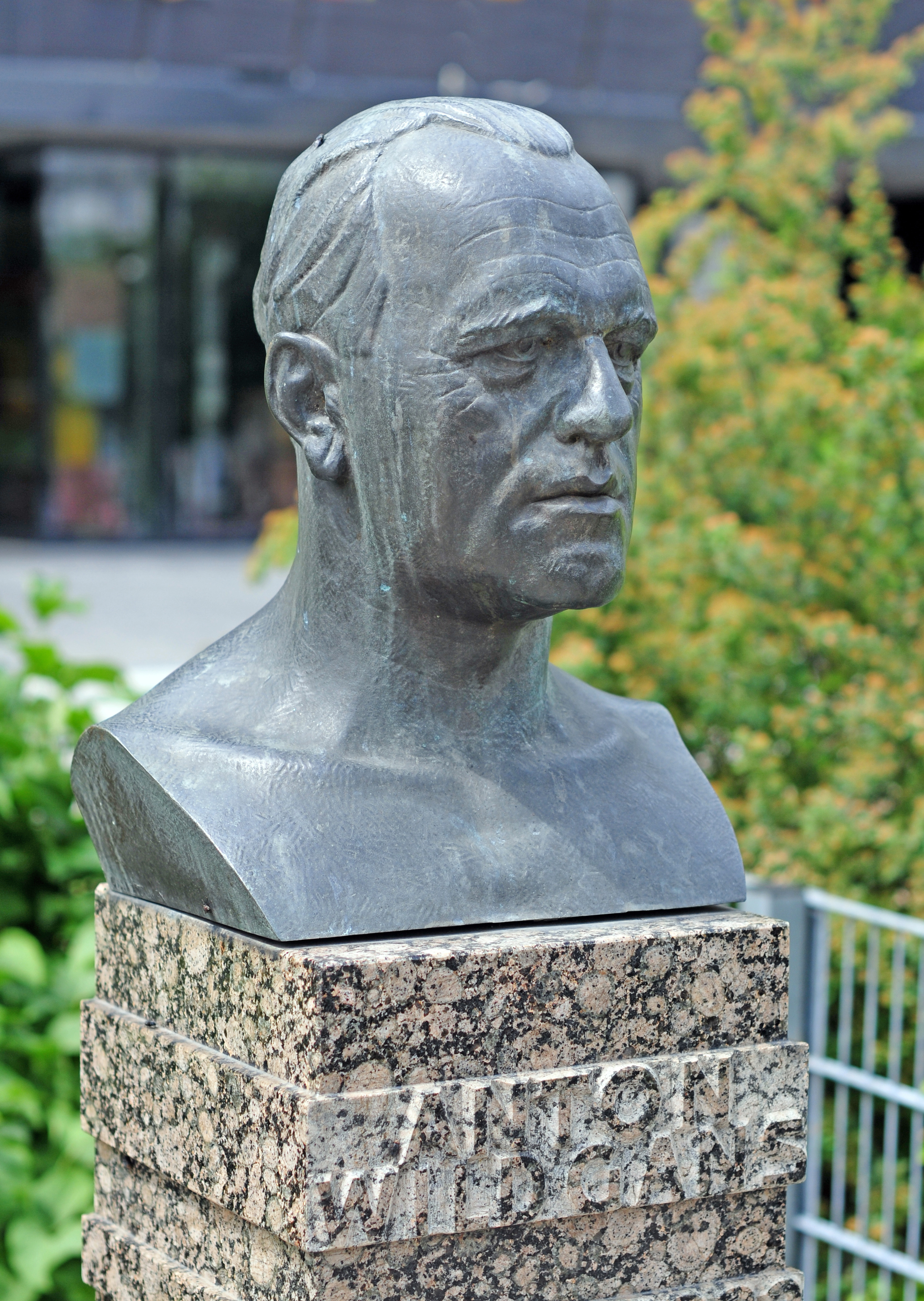 Anton Wildgans - Denkmal